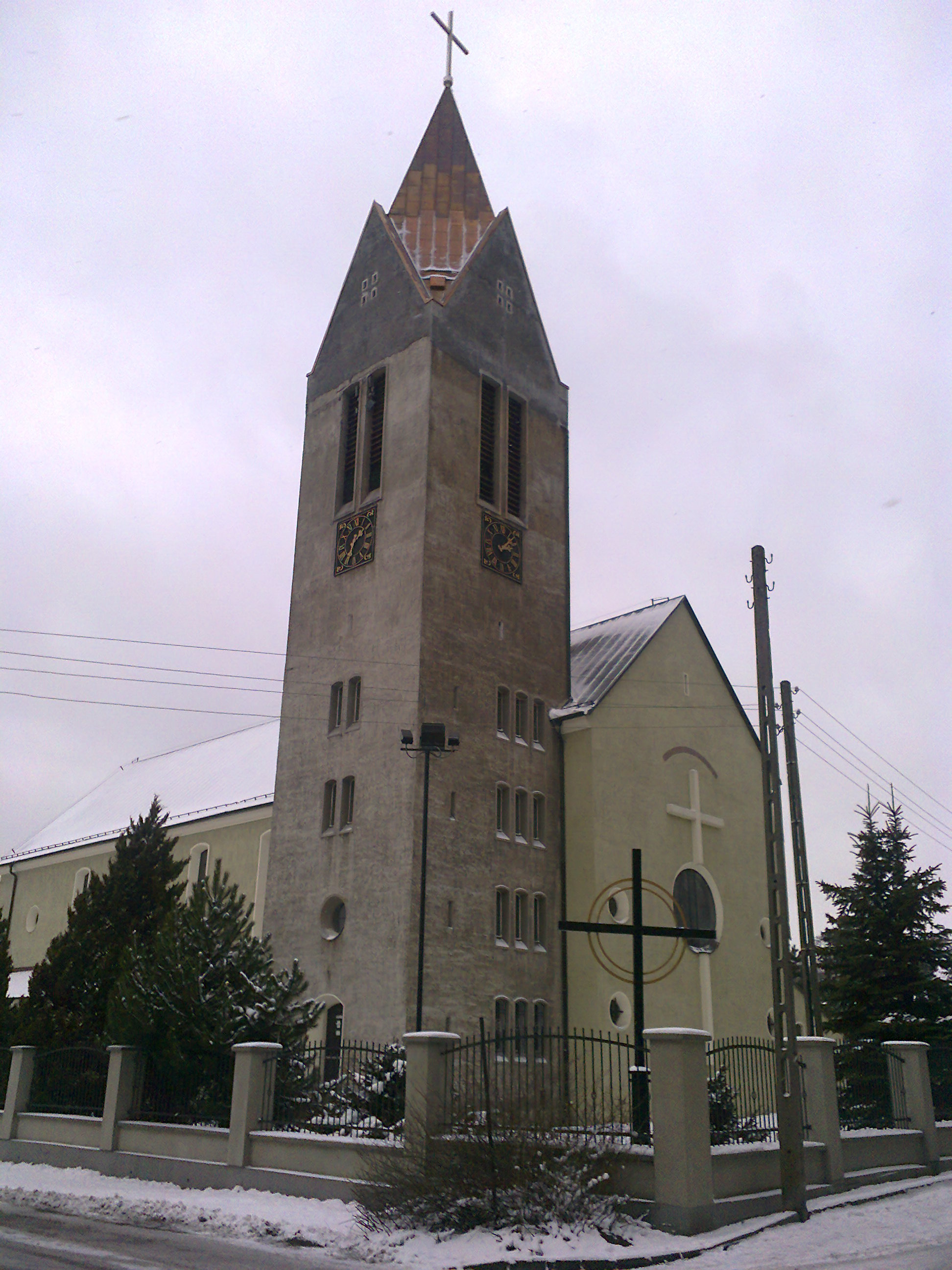 Kościół pod wezwaniem św. Jerzego w dzielnicy Gliwic - Łabędach.